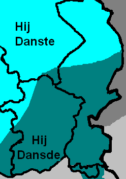 Eigen kaart